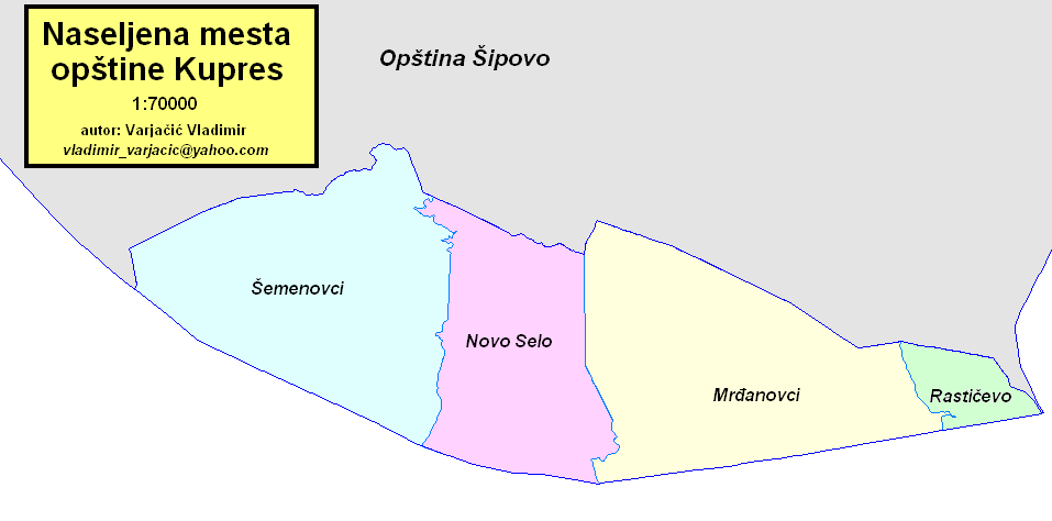 Opština Kupres